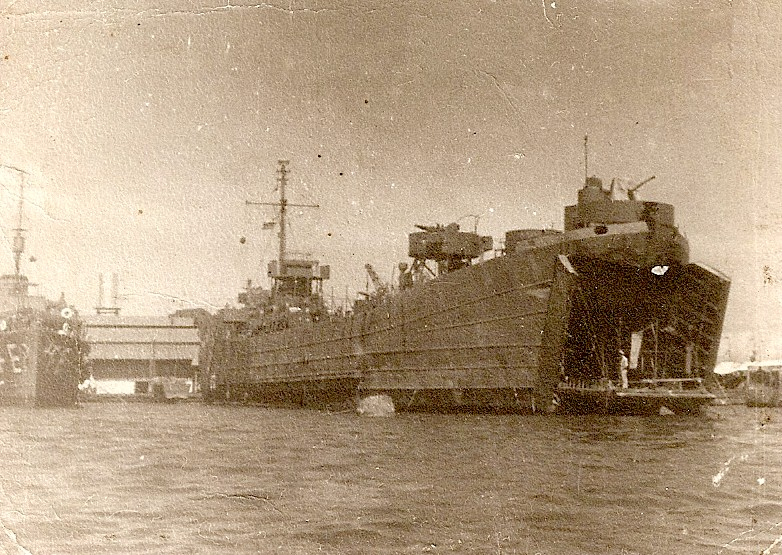 Transpote Capana - Puerto Cabello, 1958.